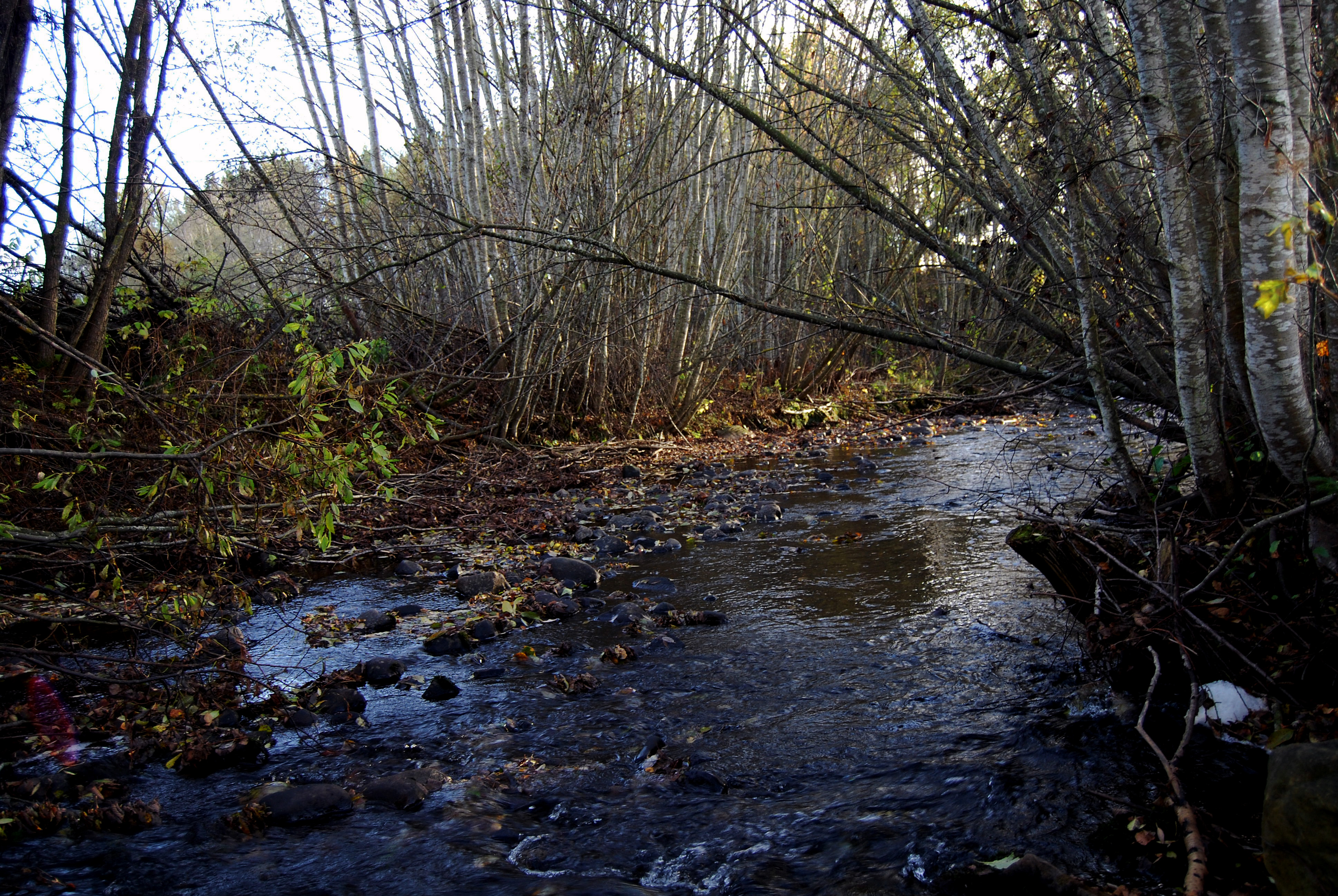 Elva Lageråa. Bildet er tatt i Hamar kommune, ikke langt unna Ilseng gård.